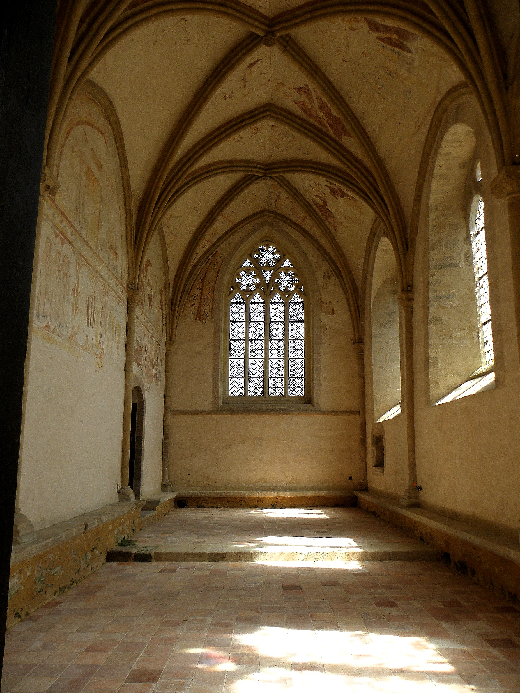 Chapelle Saint-Vincent, ancienne salle capitulaire de l'abbaye de Saint-Méen-le-Grand (35).